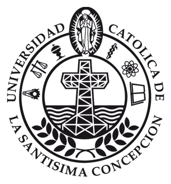 Escudo Universidad Católica de la Santísima Concepción